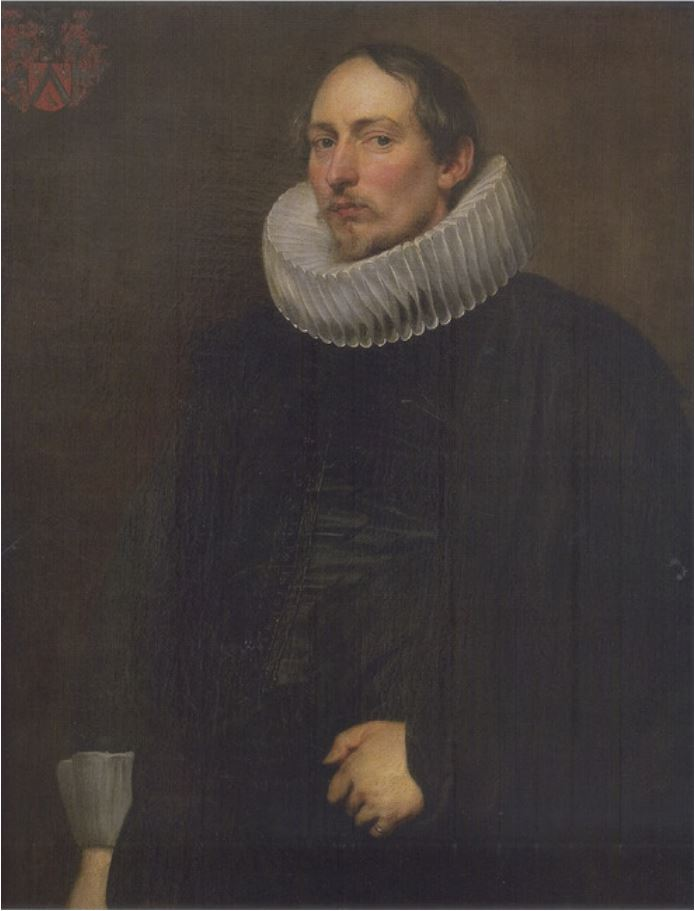 Jacques de Witte (1591 - 1631) par Antoine van Dyck - Famille de Witte (Anvers).